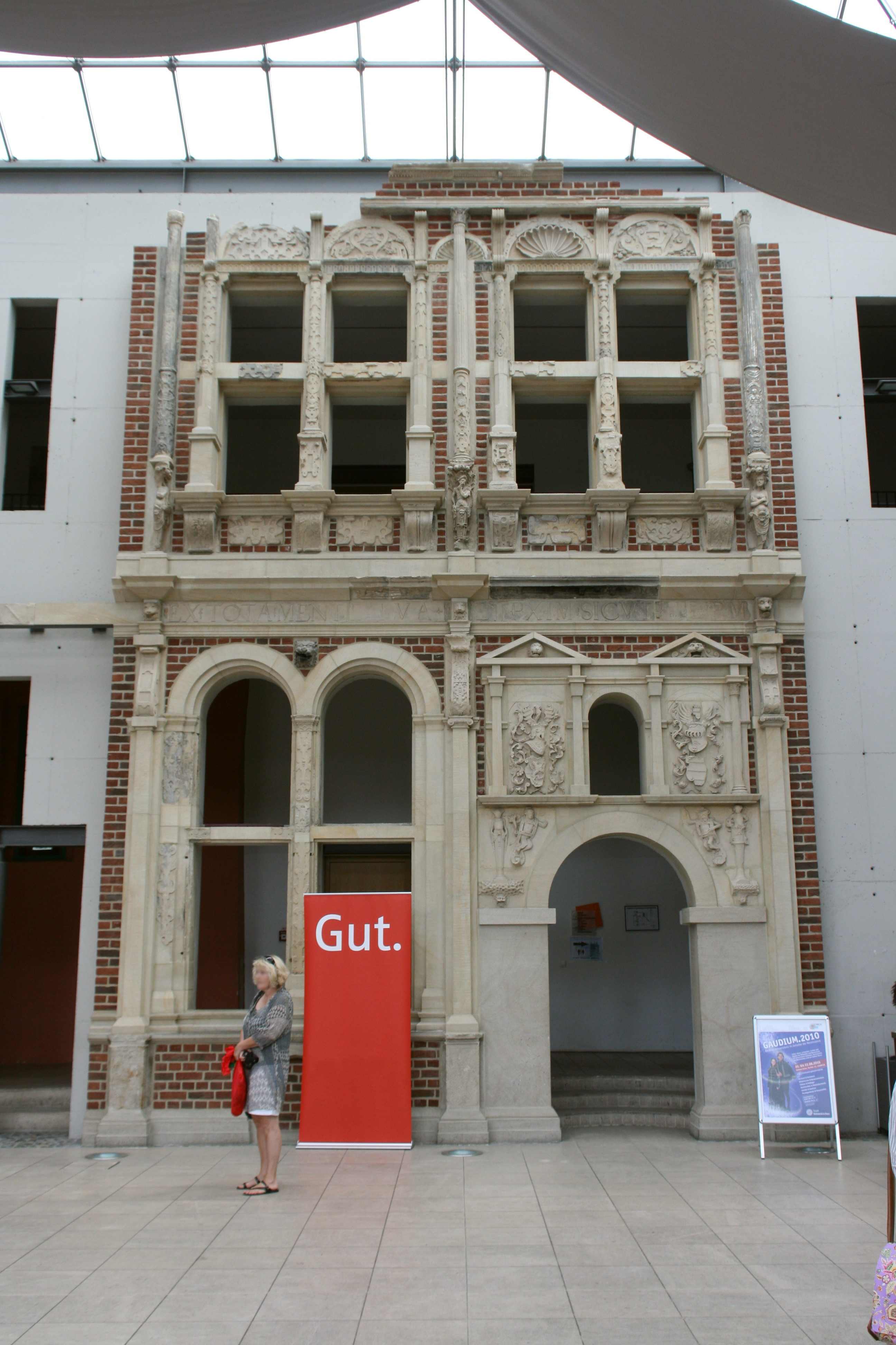 Teilrekonstruktion der Hoffassade des Herrenhausflügels von Schloss Horst in Gelsenkirchen